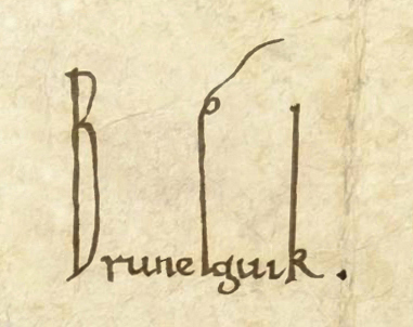 Erste urkundliche Erwähnung des Ortsnamens Braunschweig als Brunesguik: Weiheurkunde der Magnikirche aus dem Jahre 1031. Stadtarchiv Braunschweig, Signatur: A III 7: 1